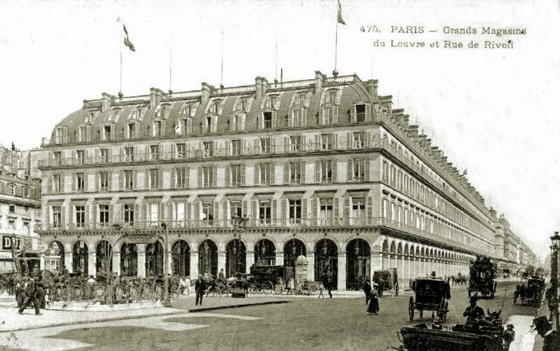 Grands Magasins du Louvre Domaine public